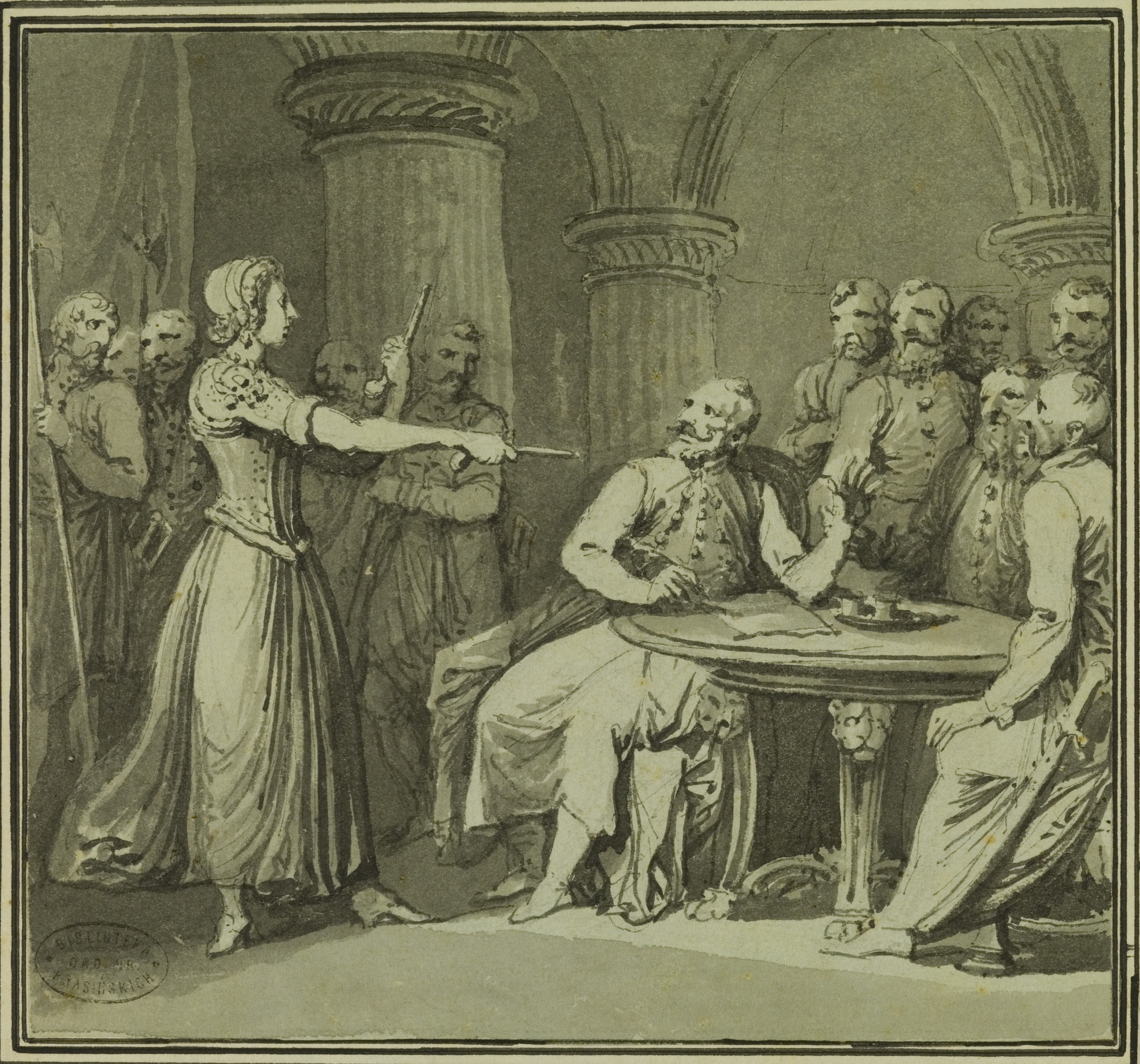 Anna Chrzanowska zachęca męża do obrony Trembowli - grafika Franciszka Smuglewicz